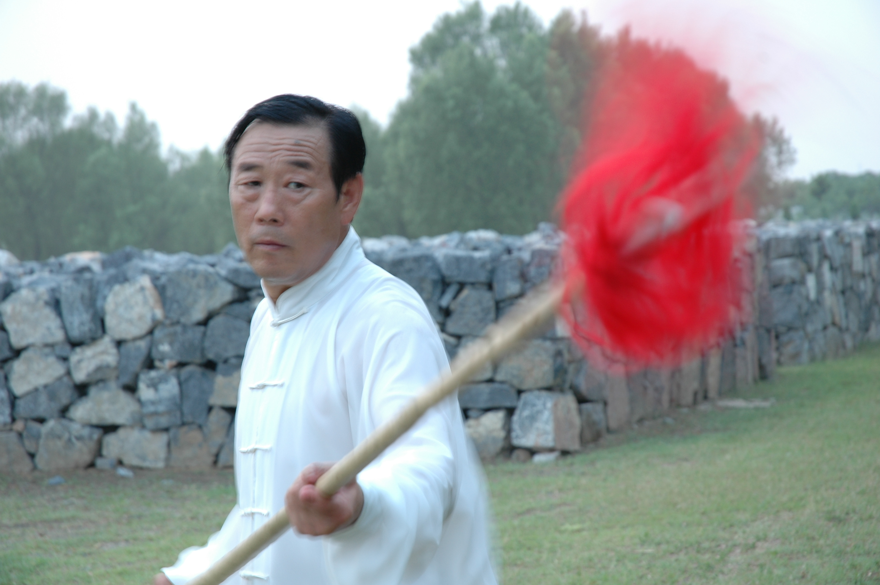 Grand maître de tai-chi-chuan style Chen